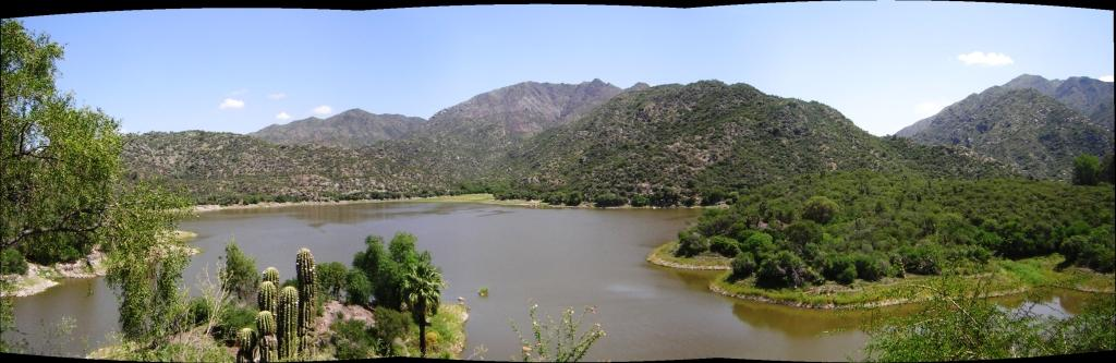 Dique San Agustín en Valle Fertil - San Juan